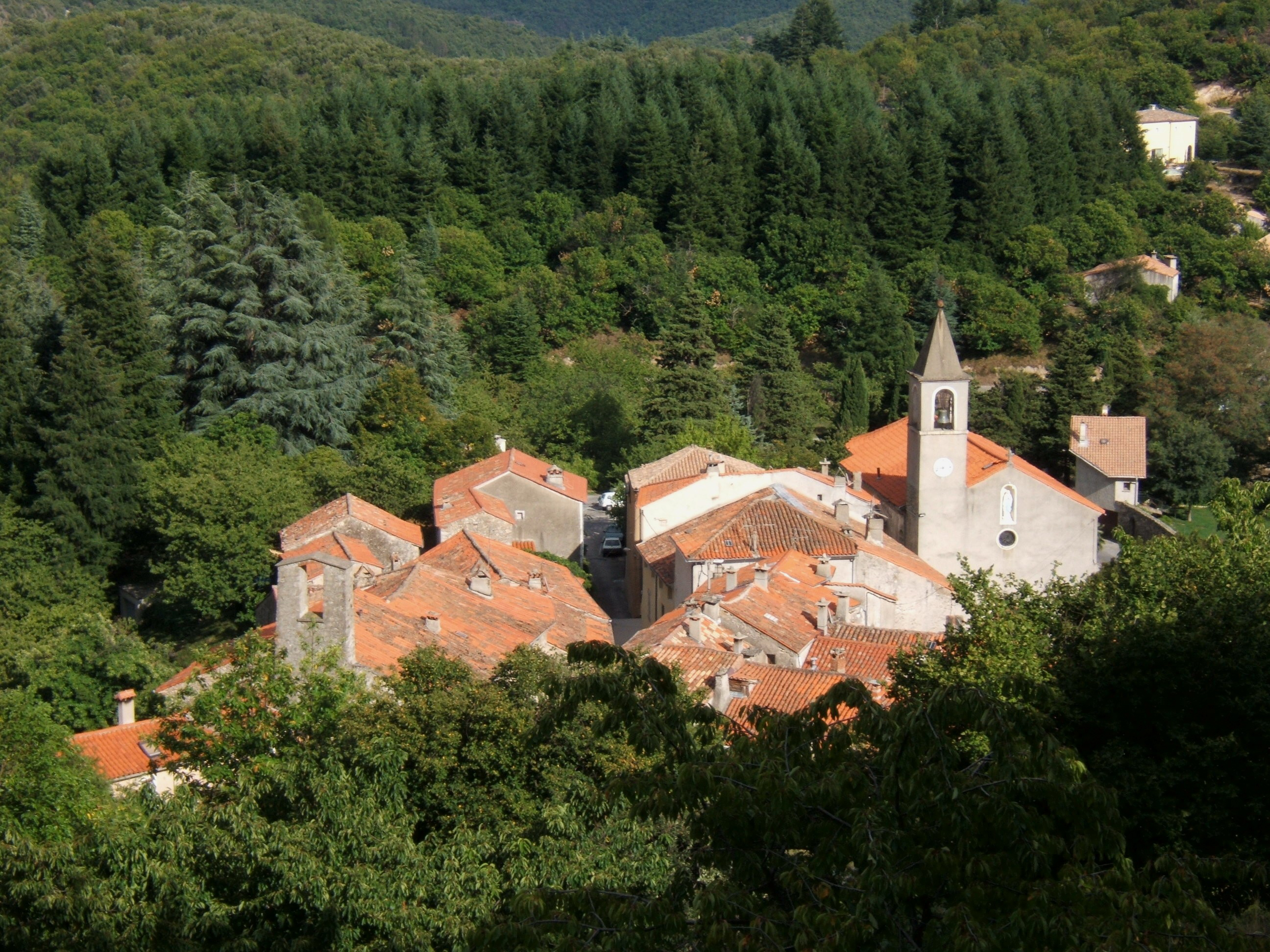 Le hameau de Beaulieu, commune de Mandagout.